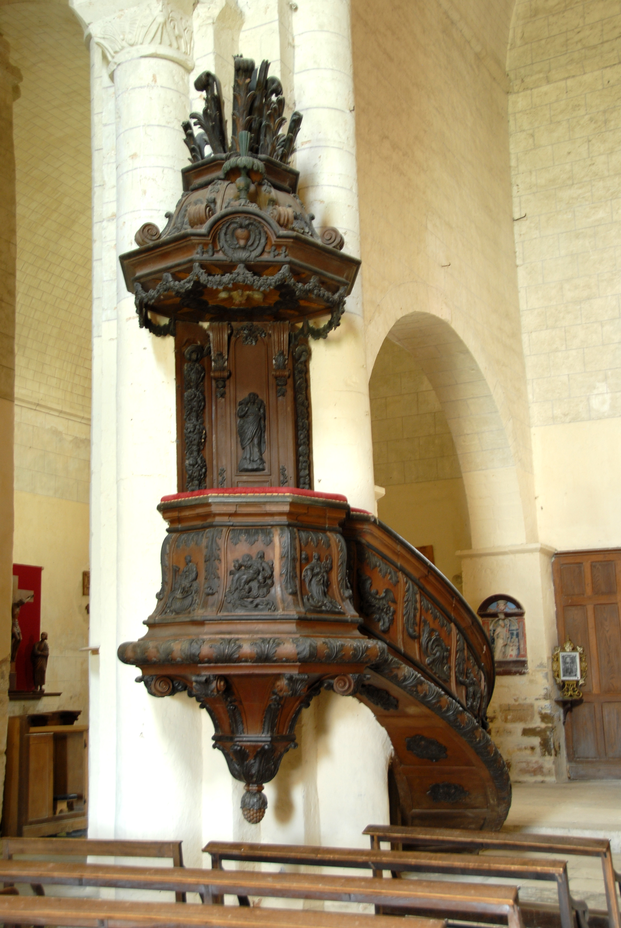 Château-Larcher, Kanzel